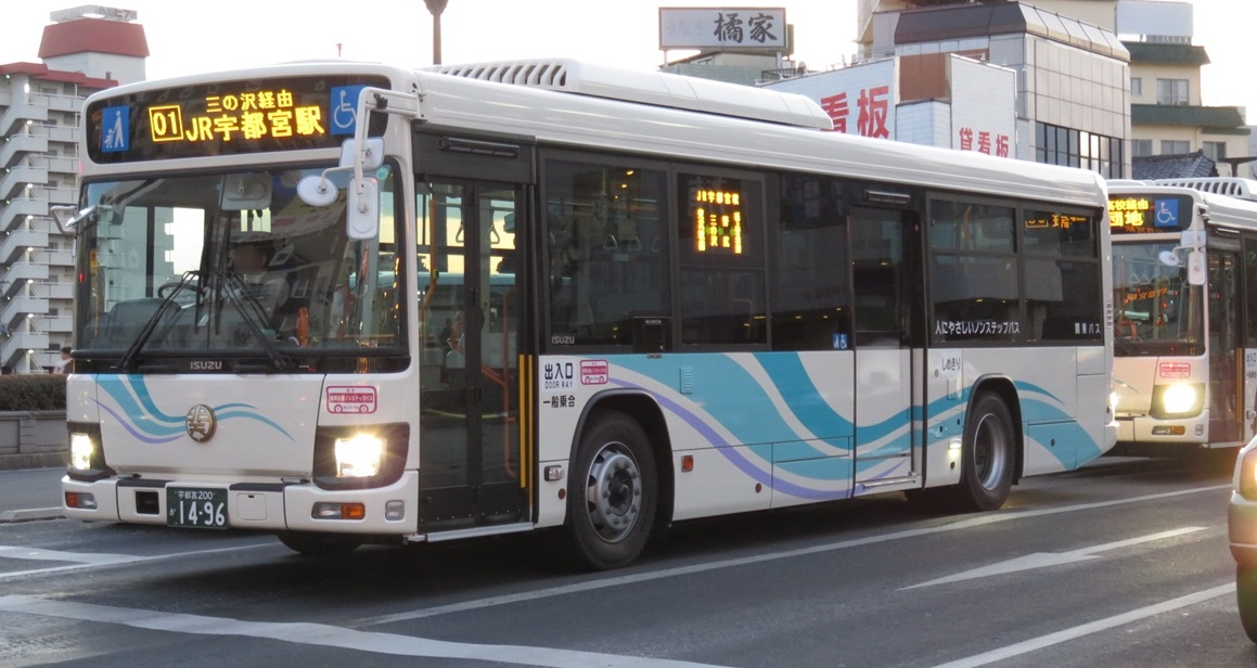 関東自動車(栃木) いすゞQKG-LV290N1 宮の橋にて撮影